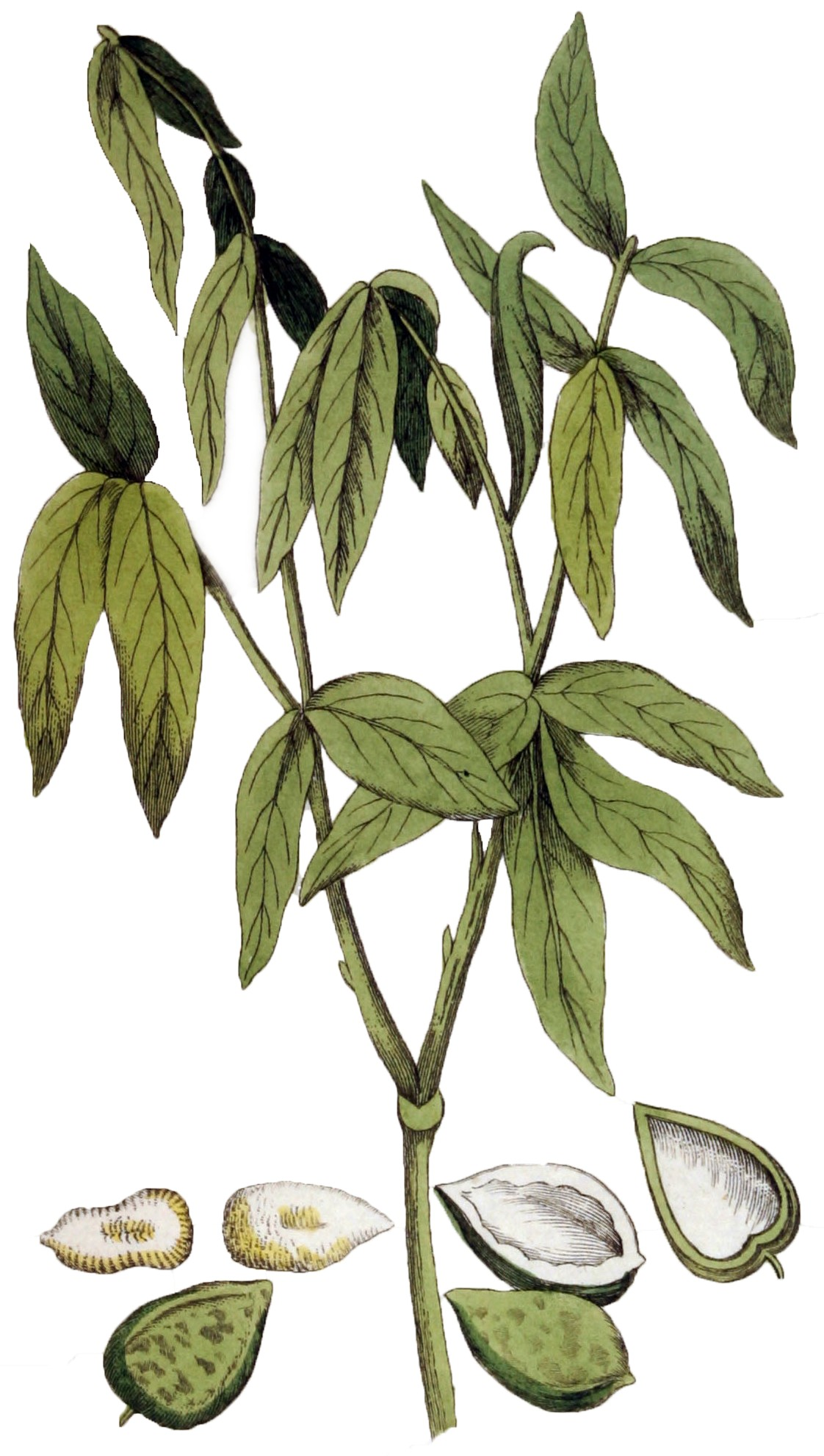 Sapindus saponaria